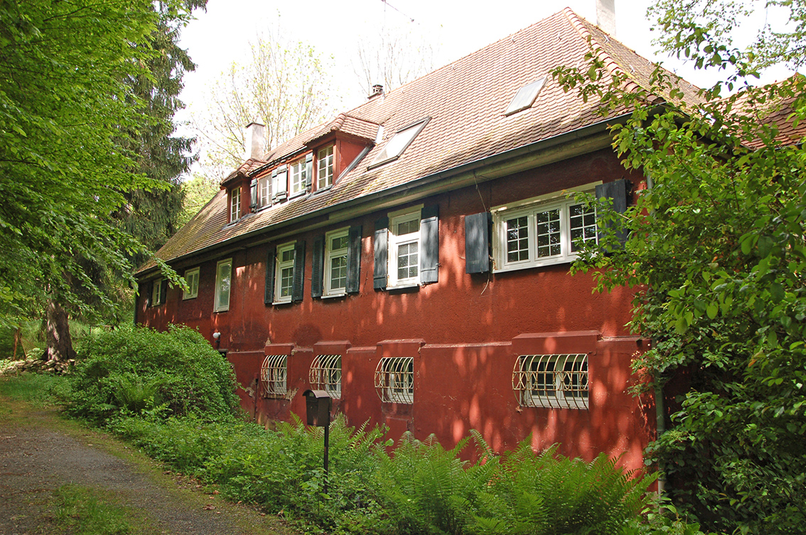 Ölmühle im Leudelsbachtal bei Markgröningen (Tammer See)